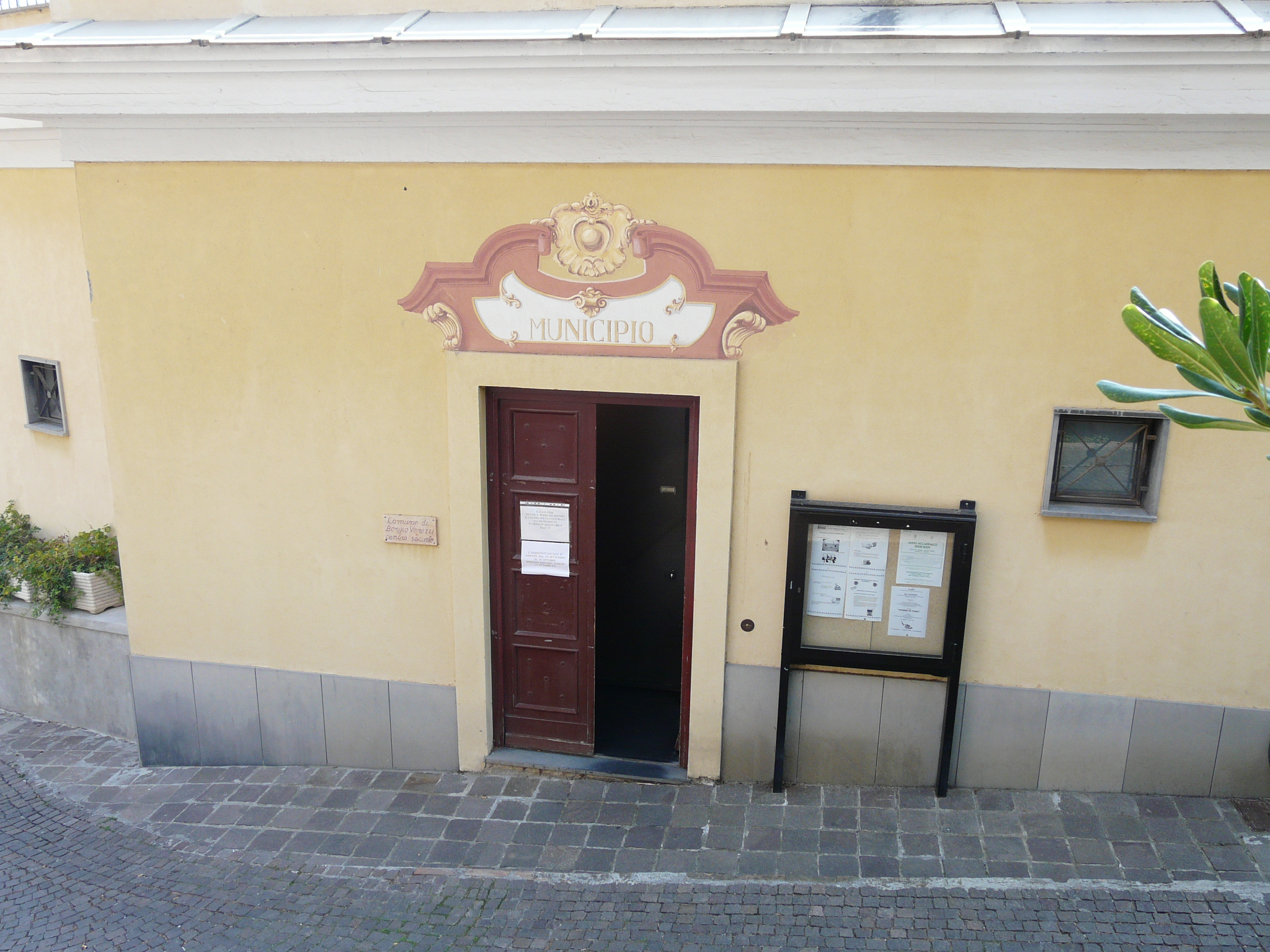 Municpio di Borgio Verezzi, Liguria, Italia